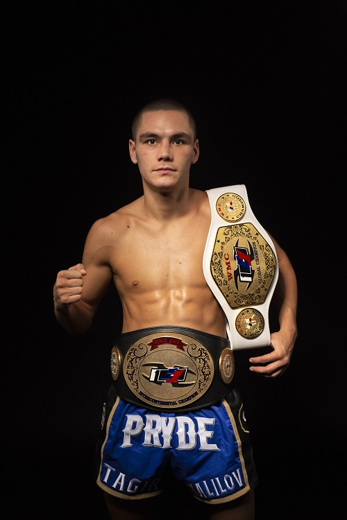 Боксёр-тайский бокс муай- тай, выступавший в полулегкой весовой категории.